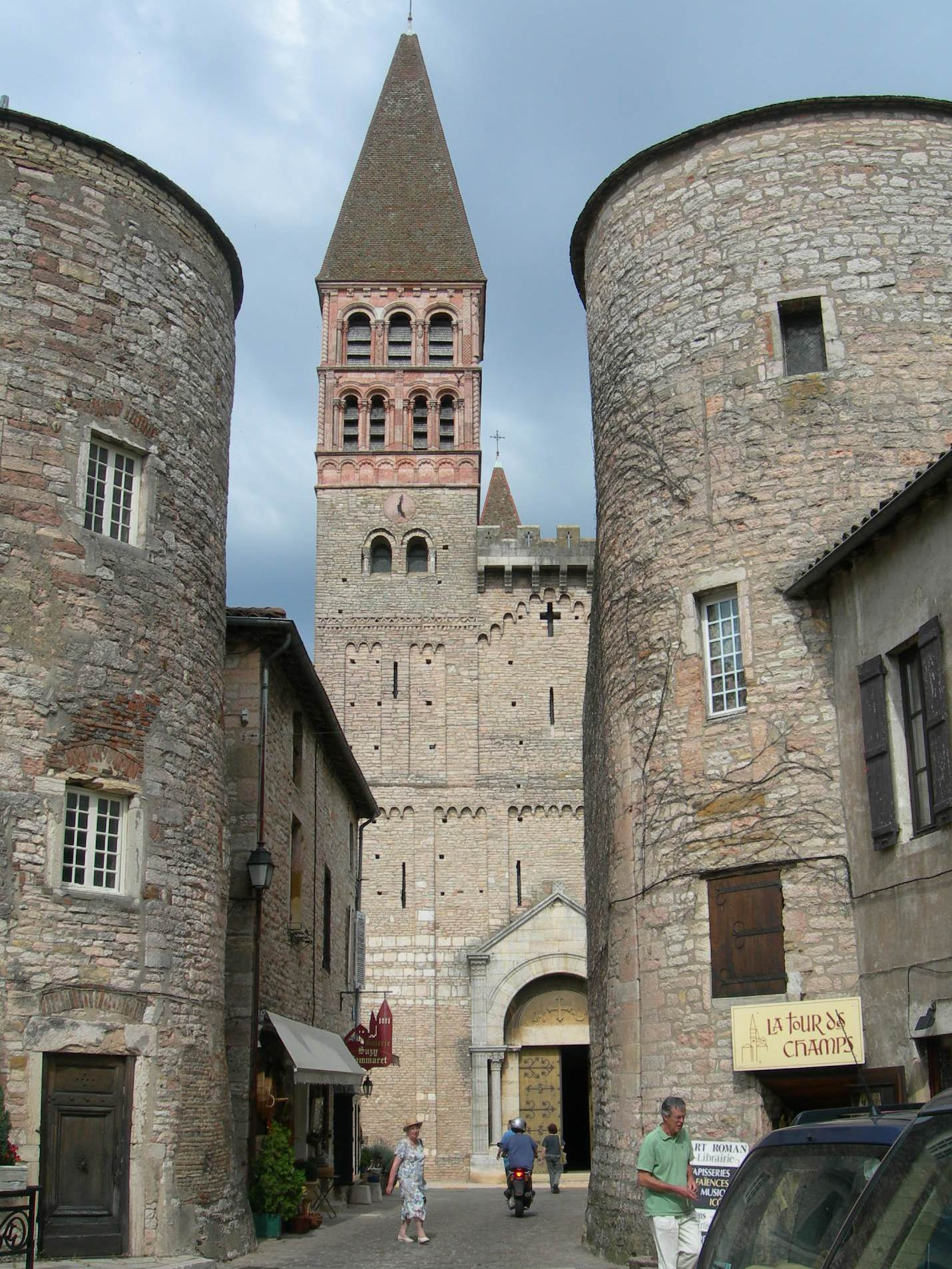 Tournus, les tours d´entrée)